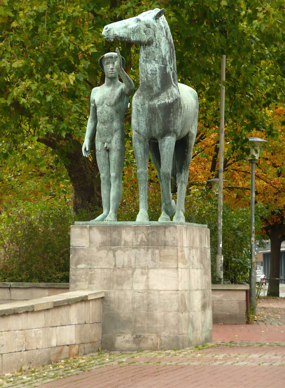 Skulptur Mann mit Pferd, Hohes Ufer